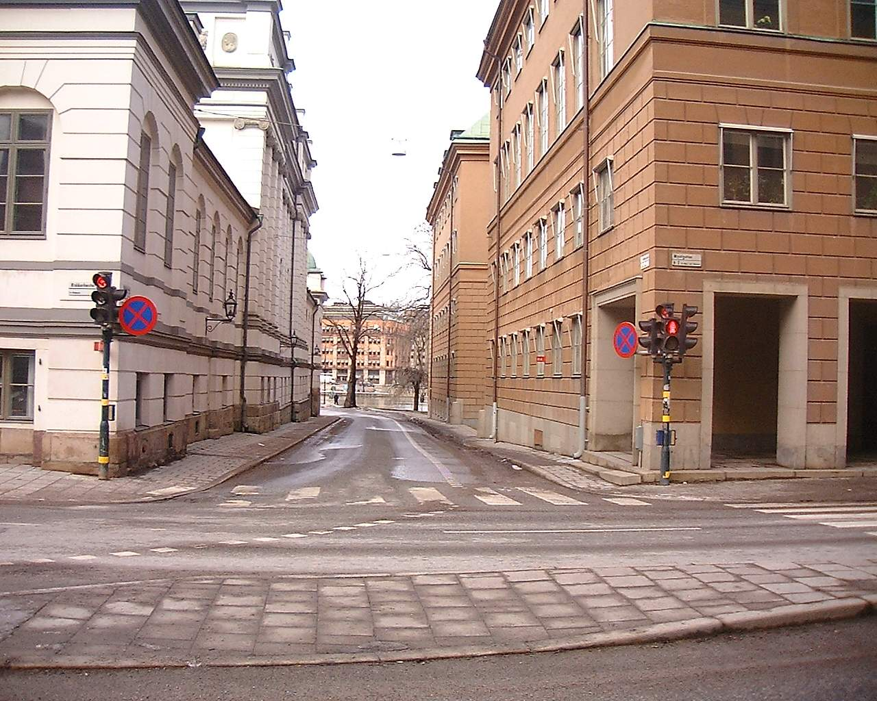 Rådshusgränd, Gamla stan, Stockholm.